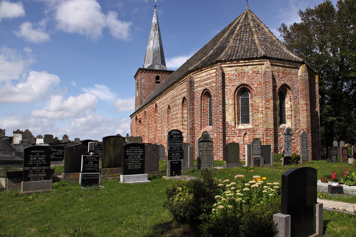 De dertiende eeuwse Sint Janskerk te Hoorn, de oudste kerk op Terschelling, van achteren gefotografeerd